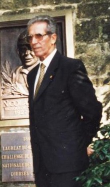 Federico Bahamontes en 1998 devant le Mémorial François et Nicolas Frantz